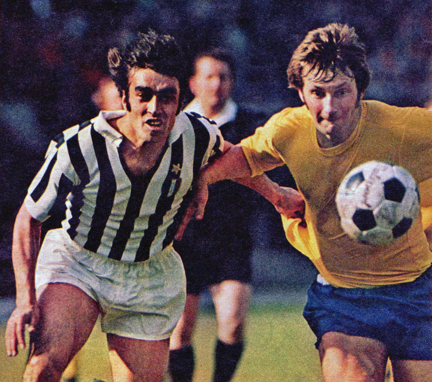 Torino, stadio Comunale, 11 aprile 1973. Da sinistra: l'attaccante dei Bianconeri Pietro Anastasi alle prese con il difensore dei Rams Colin Todd, nella sfida tra Juventus e Derby County (3-1) valevole per la semifinale di andata della Coppa dei Campioni 1972-73; nell'occasione la squadra ospite indossò la sua divisa di cortesia gialloblù.